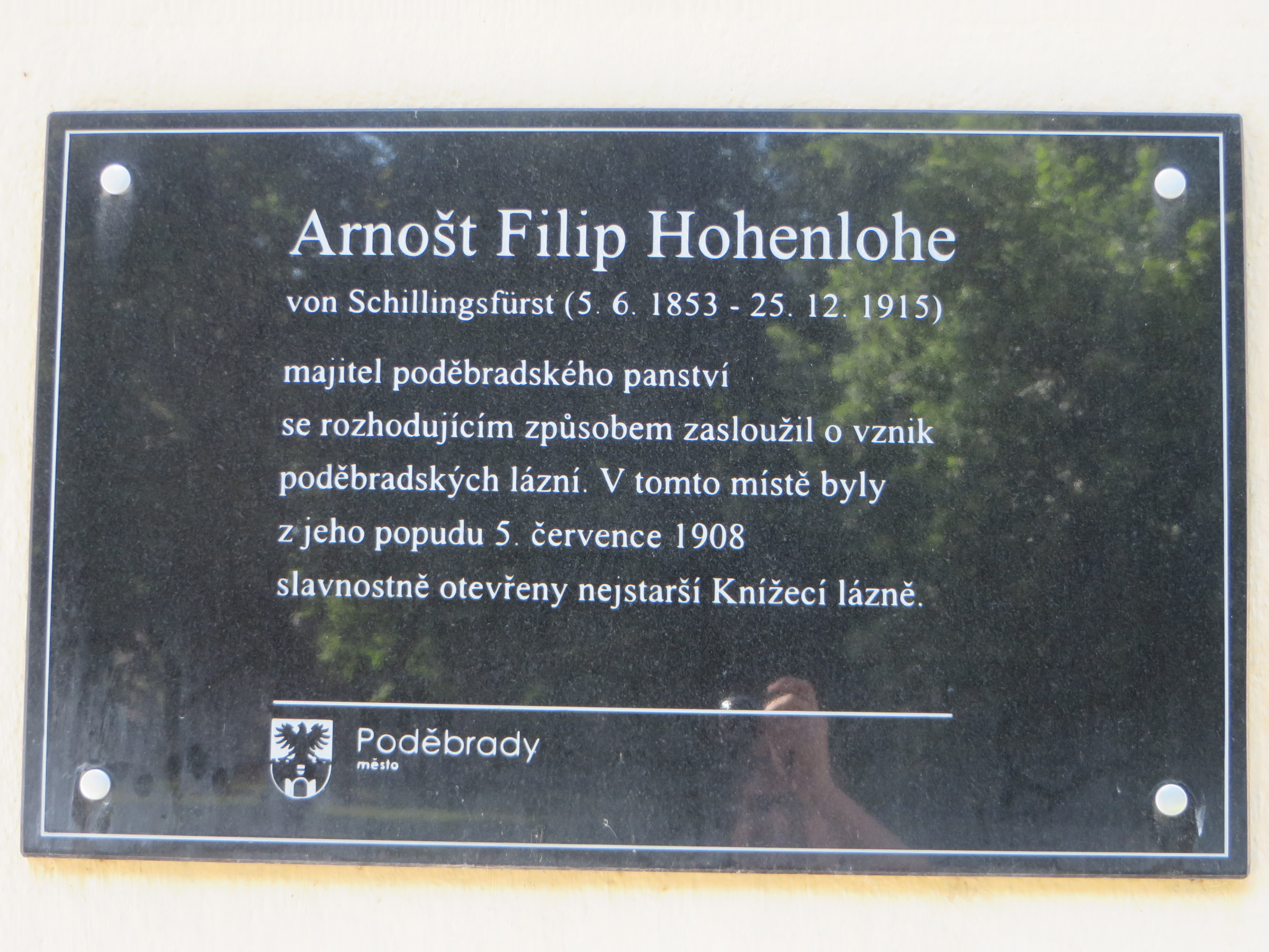 Pamětní deska zakladatele lázní A. F. Hohenlohe.